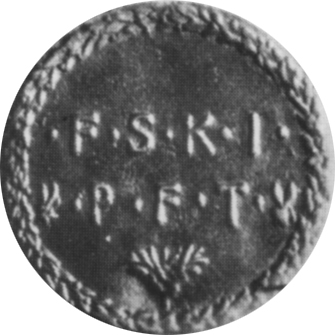 Medaglia con autoritratto di pisanello, 5,7 cm, verso